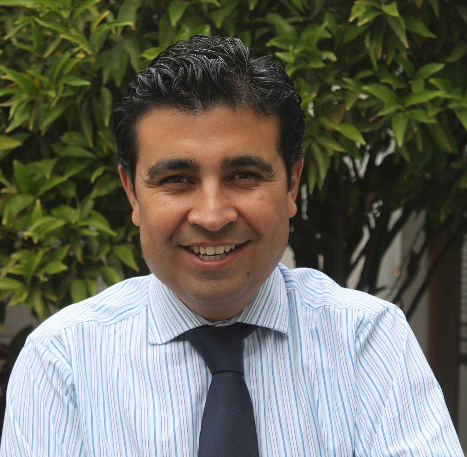 Foto de Gianni Rivera Foo, Gobernador de la provincia de Marga Marga